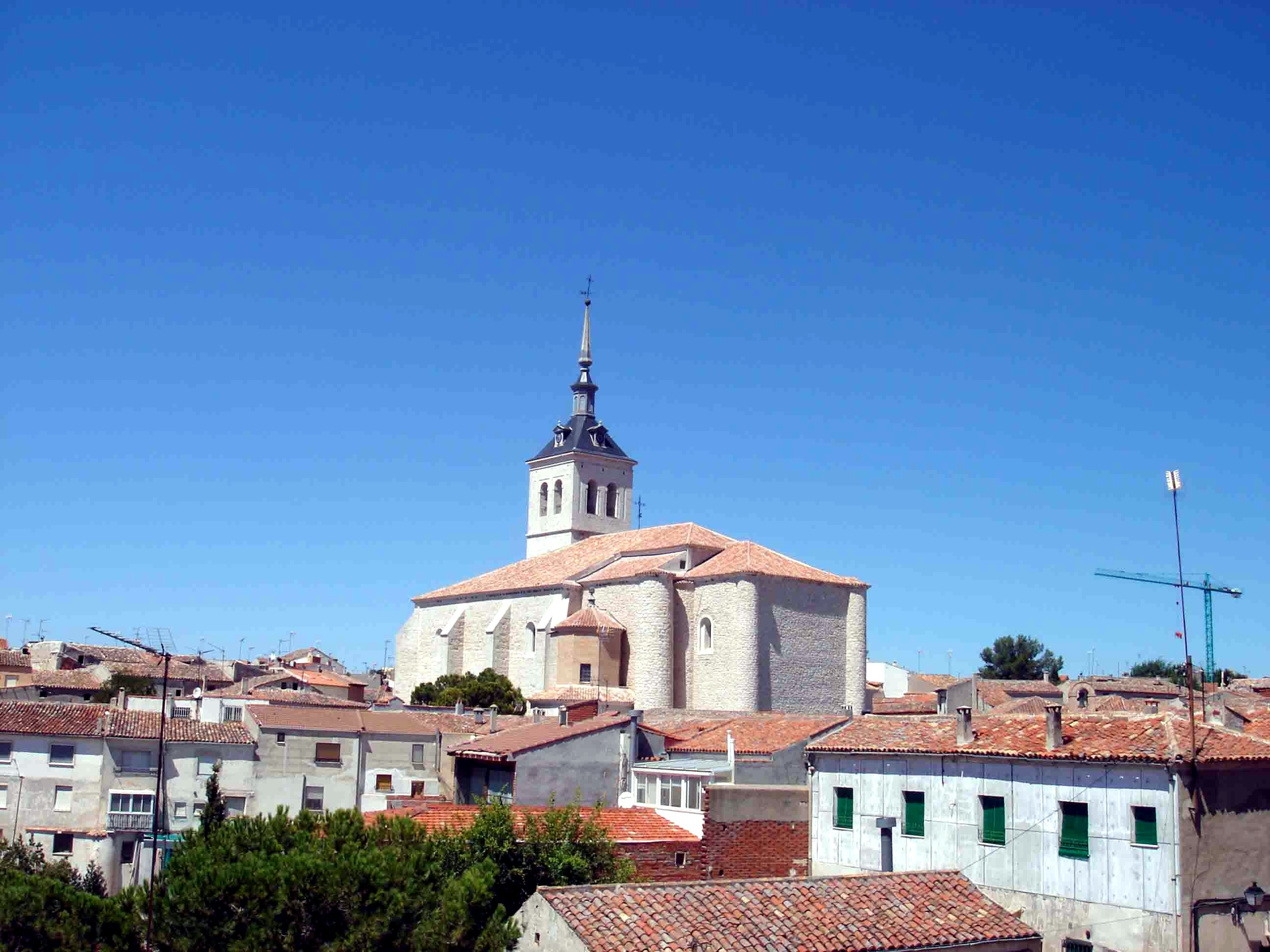 Iglesia parroquial de Santa María la Mayor. Colmenar de Oreja. Madrid. España.